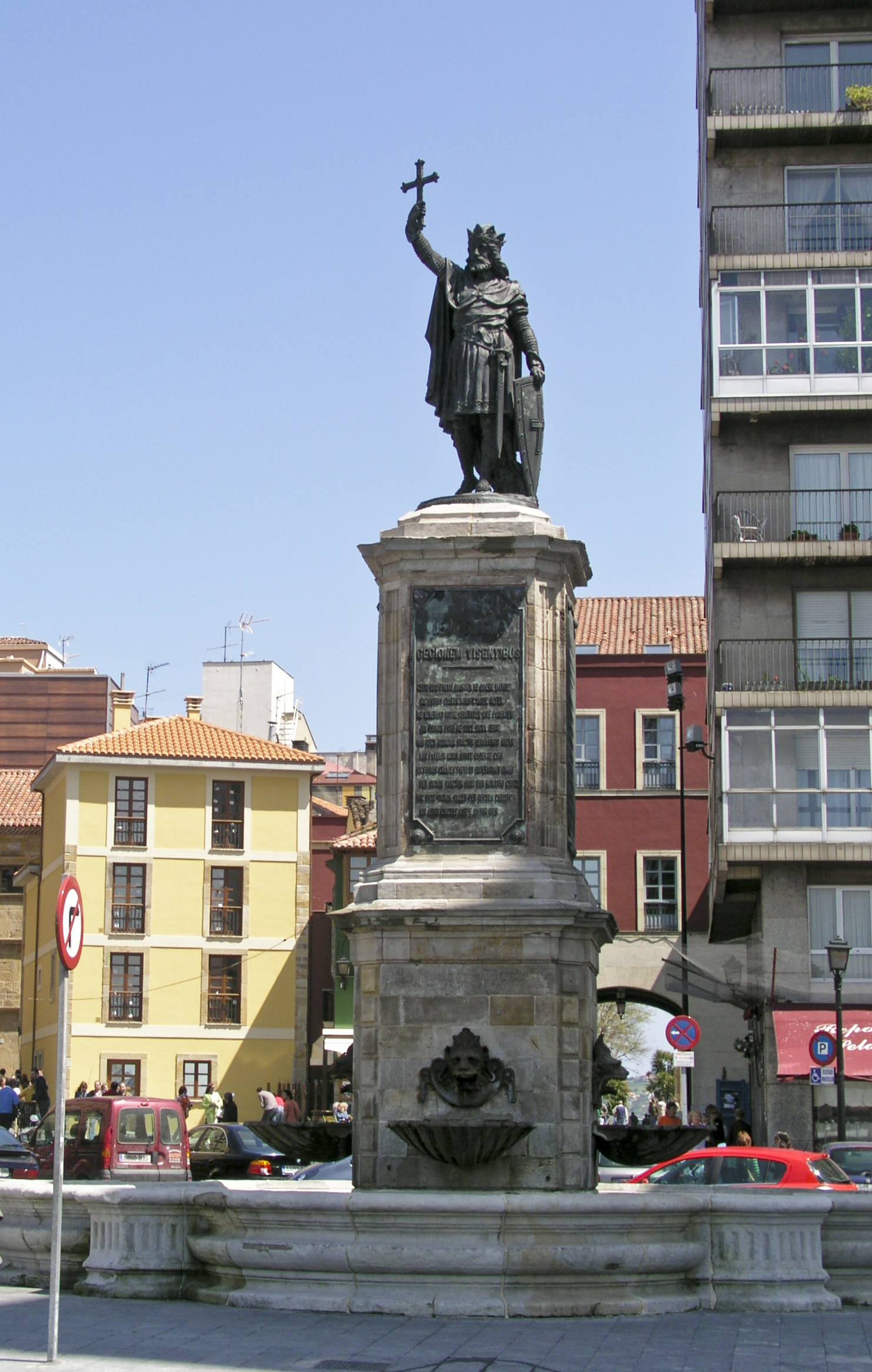 Pelayo I of Asturias, Gijón